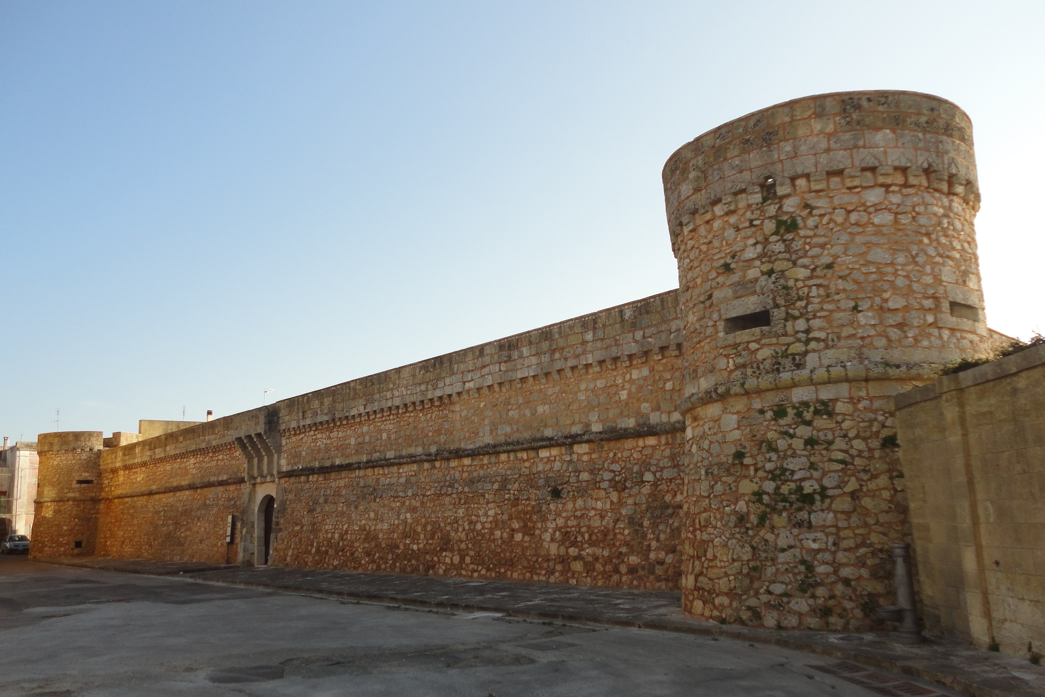 Castello di Caprarica del Capo, Tricase, Lecce